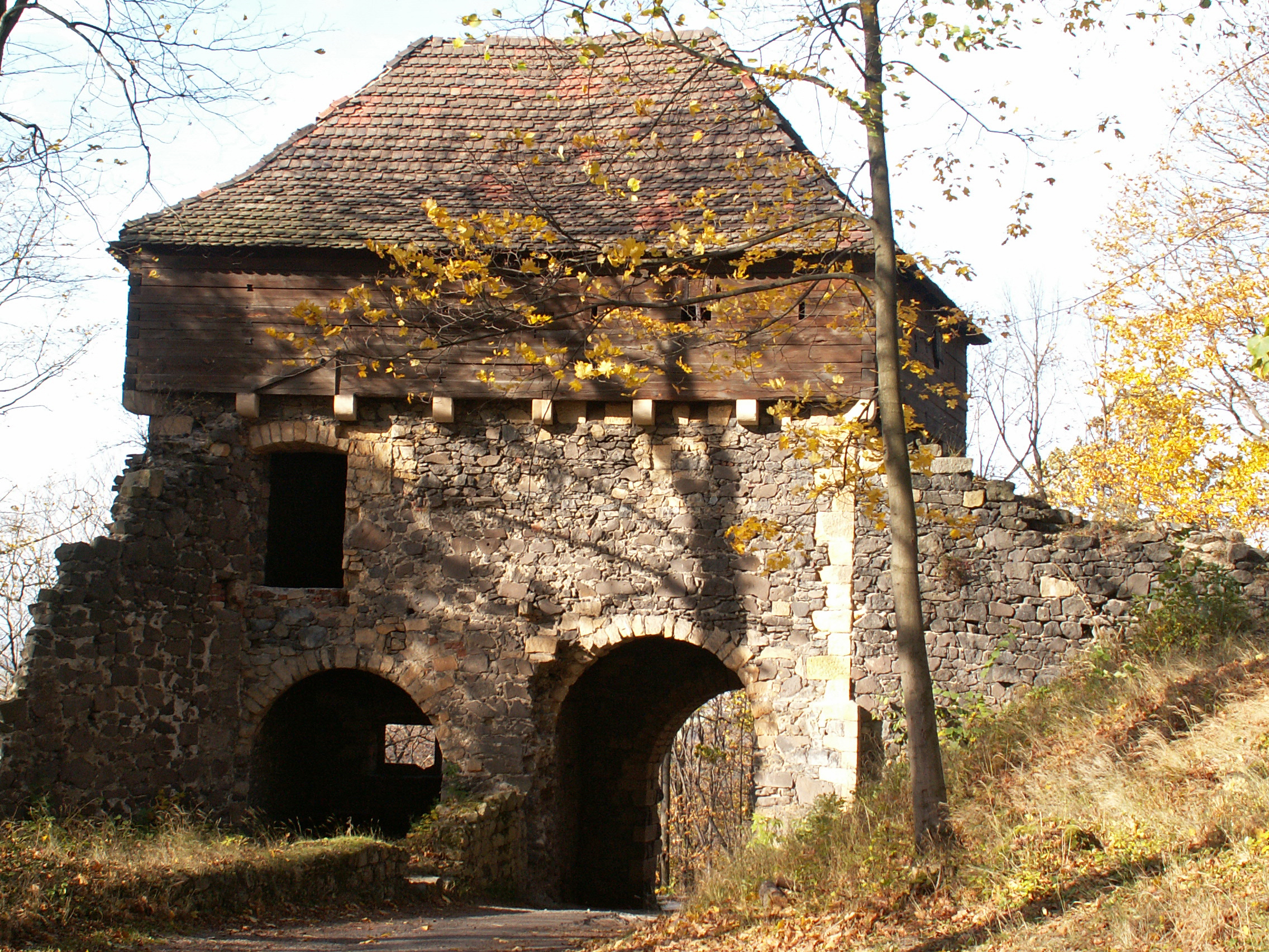 zespół zamkowy, XV-XX: - zamek Grodziec, gmina Zagrodno, powiat złotoryjski